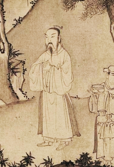 Trần Anh Tông trong bức Trúc Lâm Đại sĩ xuất sơn đồ